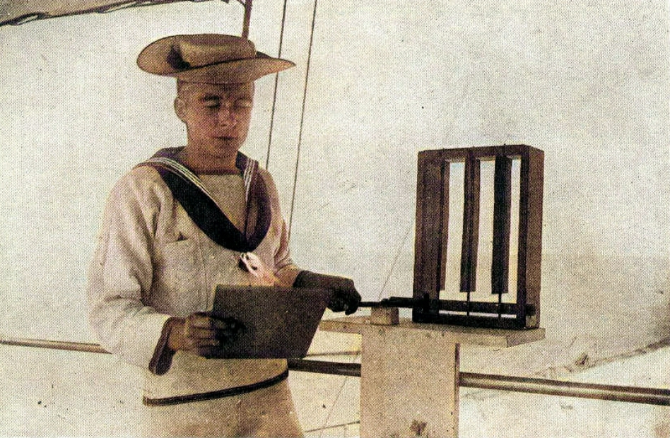 Radiotélégraphie: système de communication optique expérimenté à bord du HMS Scylla vers 1898. Le capitaine Percy Scott à bord du HMS Scylla améliora les systèmes radiotélégraphiques existants en plaçant une série de lattes comme pour un store vénitien devant une source lumineuse ici un miroir réfléchissant le soleil; lorsque l’opérateur appuie sur une touche les lattes tournent radialement au miroir et donc l’expose, lorsqu’il relâche la touche la lumière réfléchit est obscurcie.